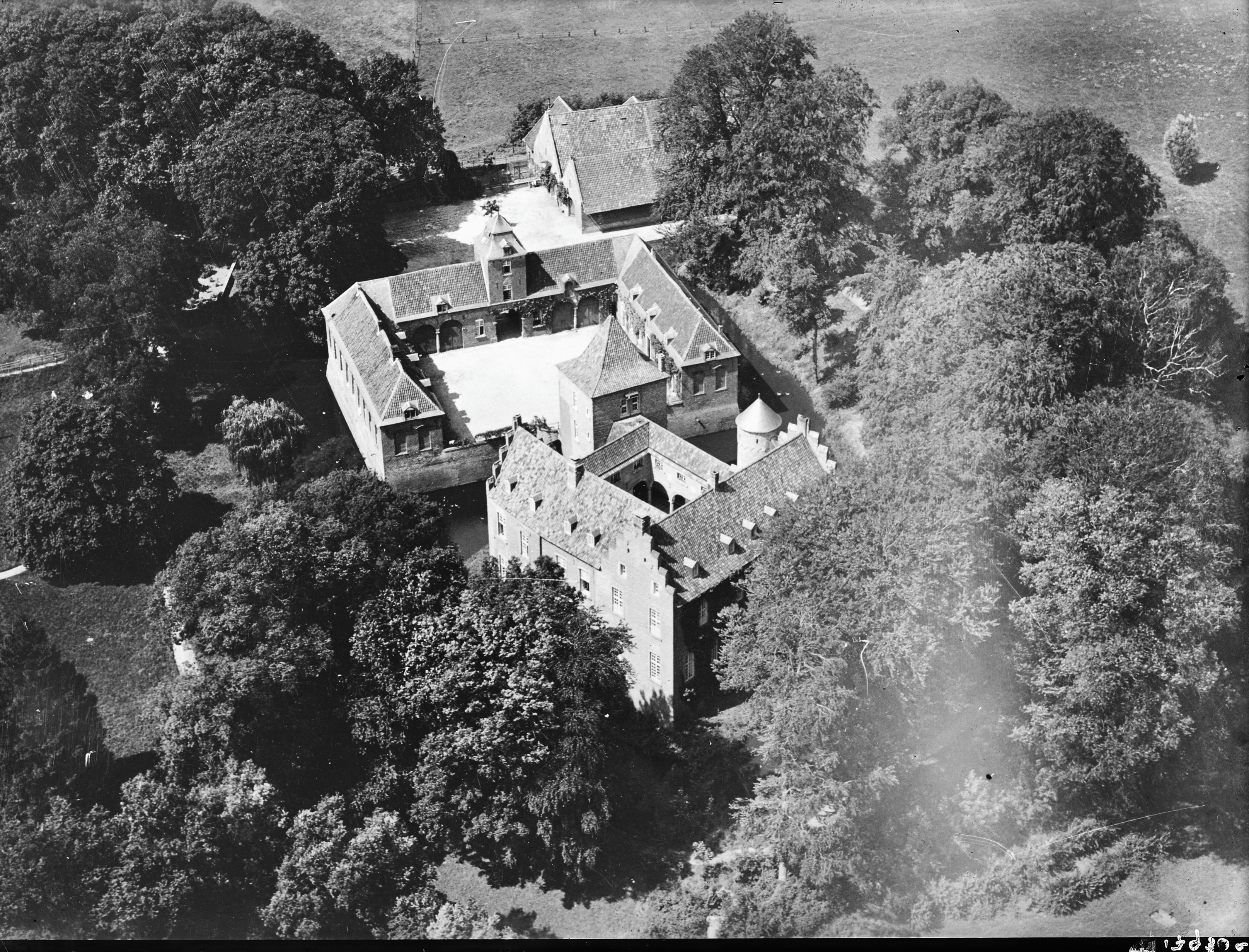 Kasteel Geysteren: luchtfoto